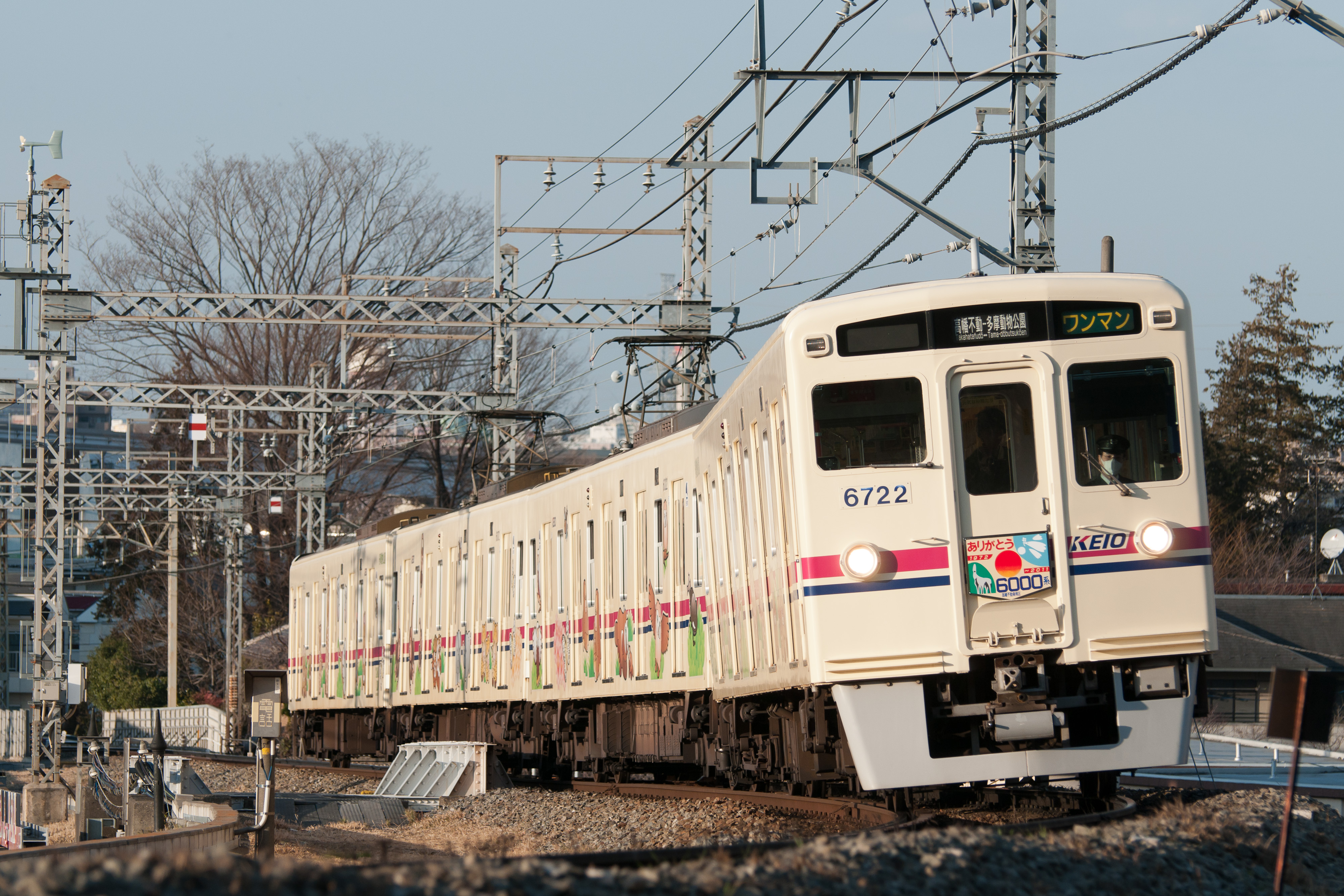 京王動物園線の6000系。